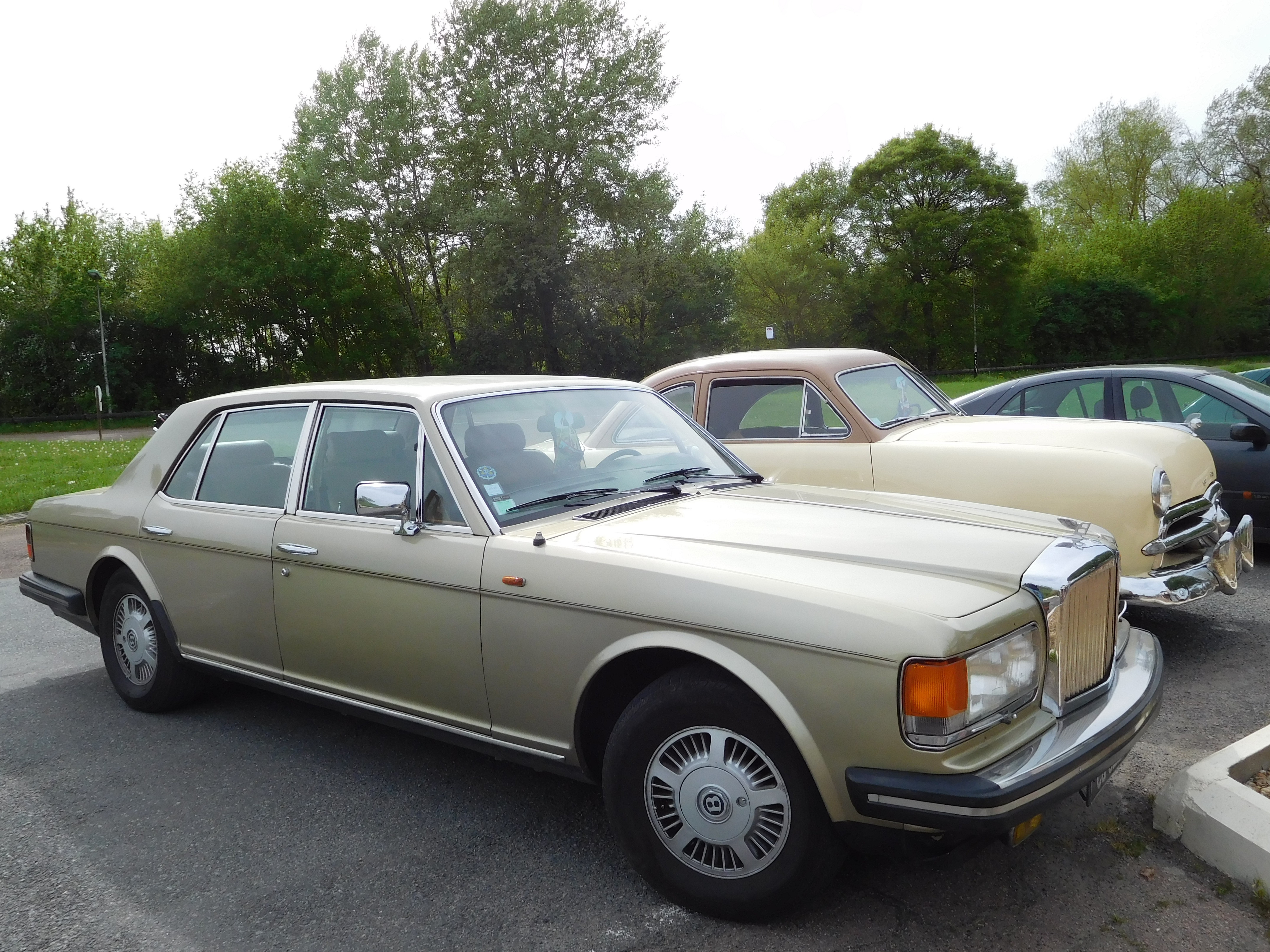 Bentley Mulsanne S, beige, au Relais des 200 bornes (Pouilly-sur-Loire, Nièvre, France).